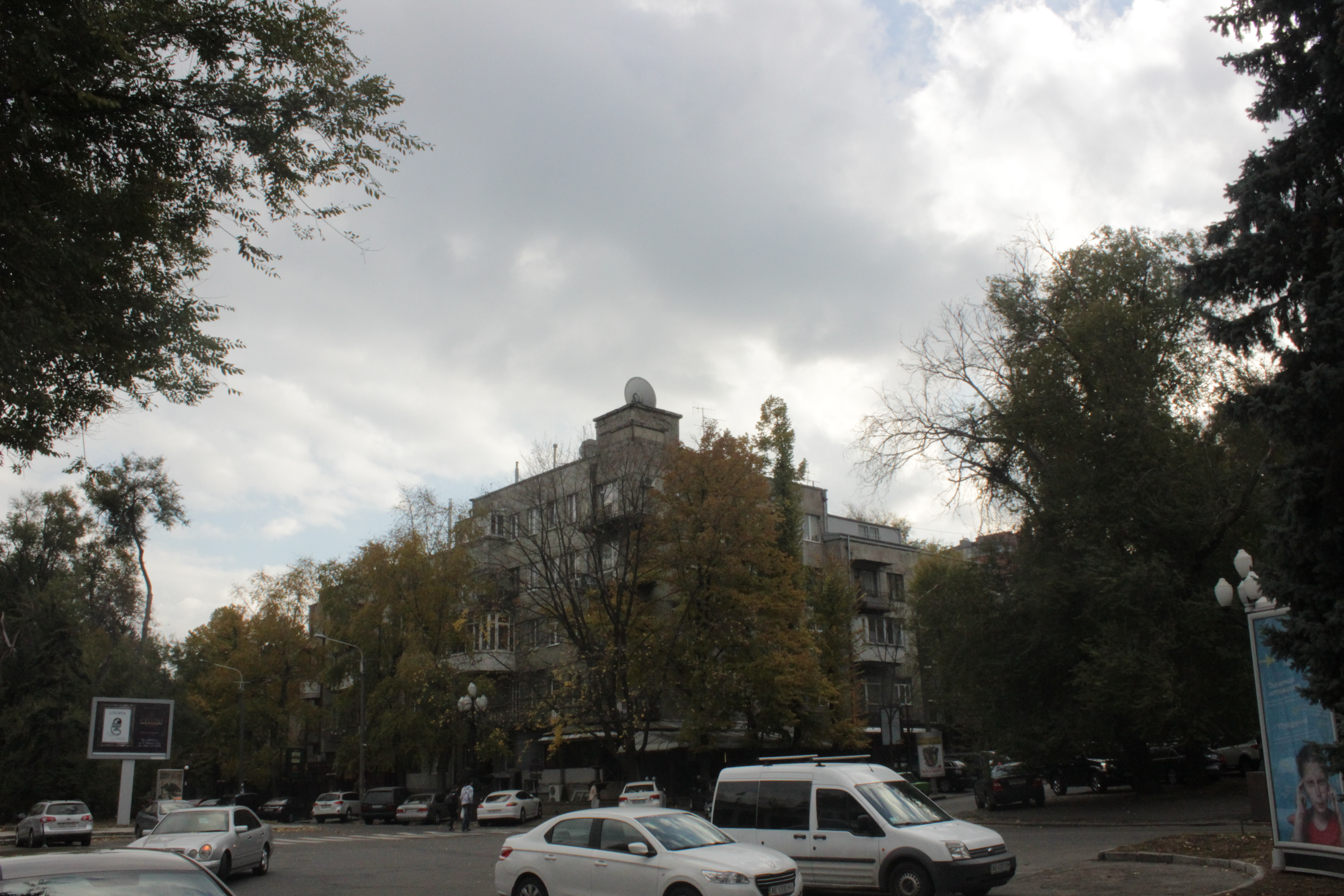 Житловий будинок товариства колишніх політкаторжан, Дніпро, Жовтневий пров., 6 (Яворницького вул.)